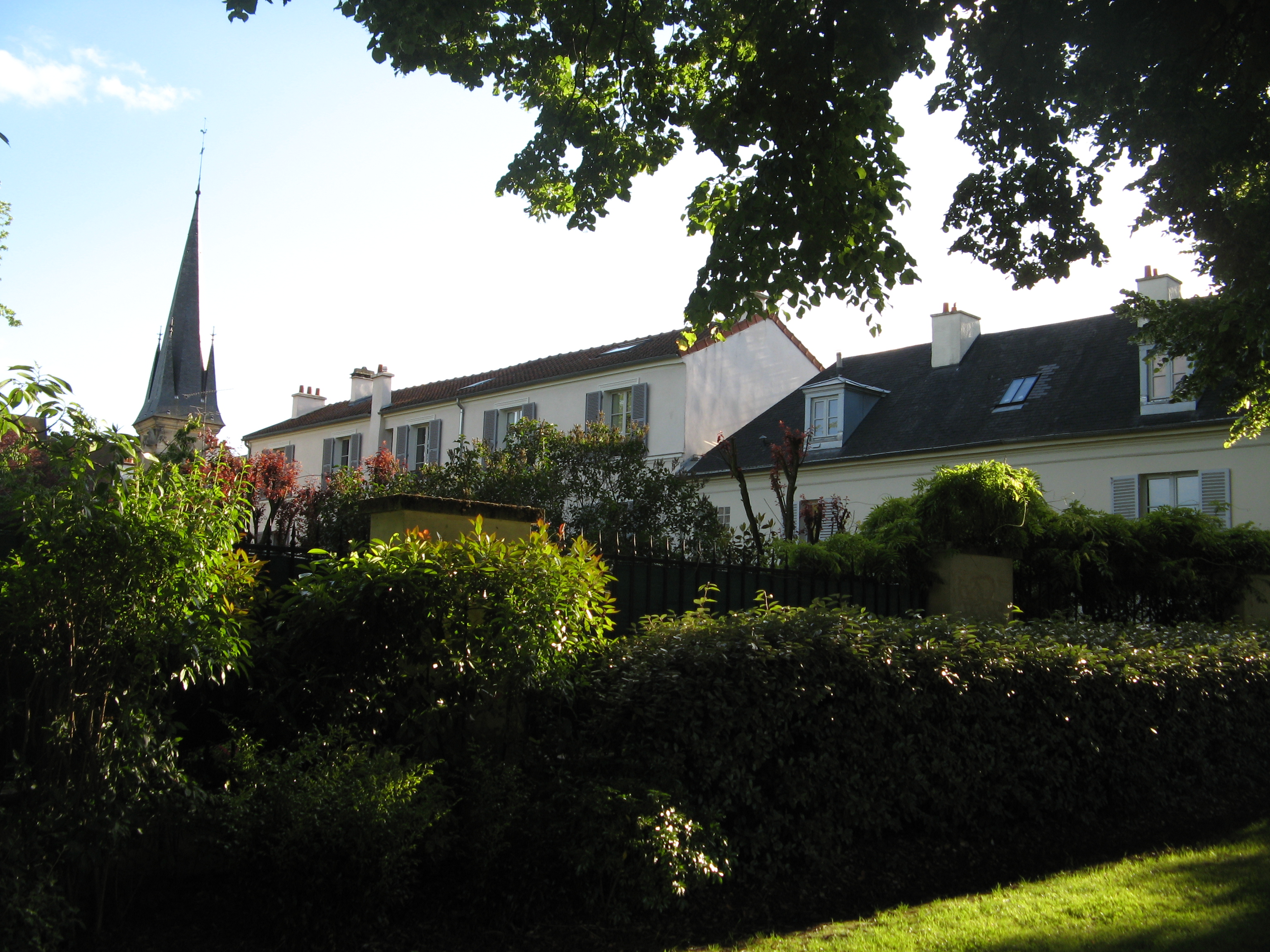 Vue de de l'ancienne gare de Sceaux reconvertie en habitation depuis le jardin de la Ménagerie.